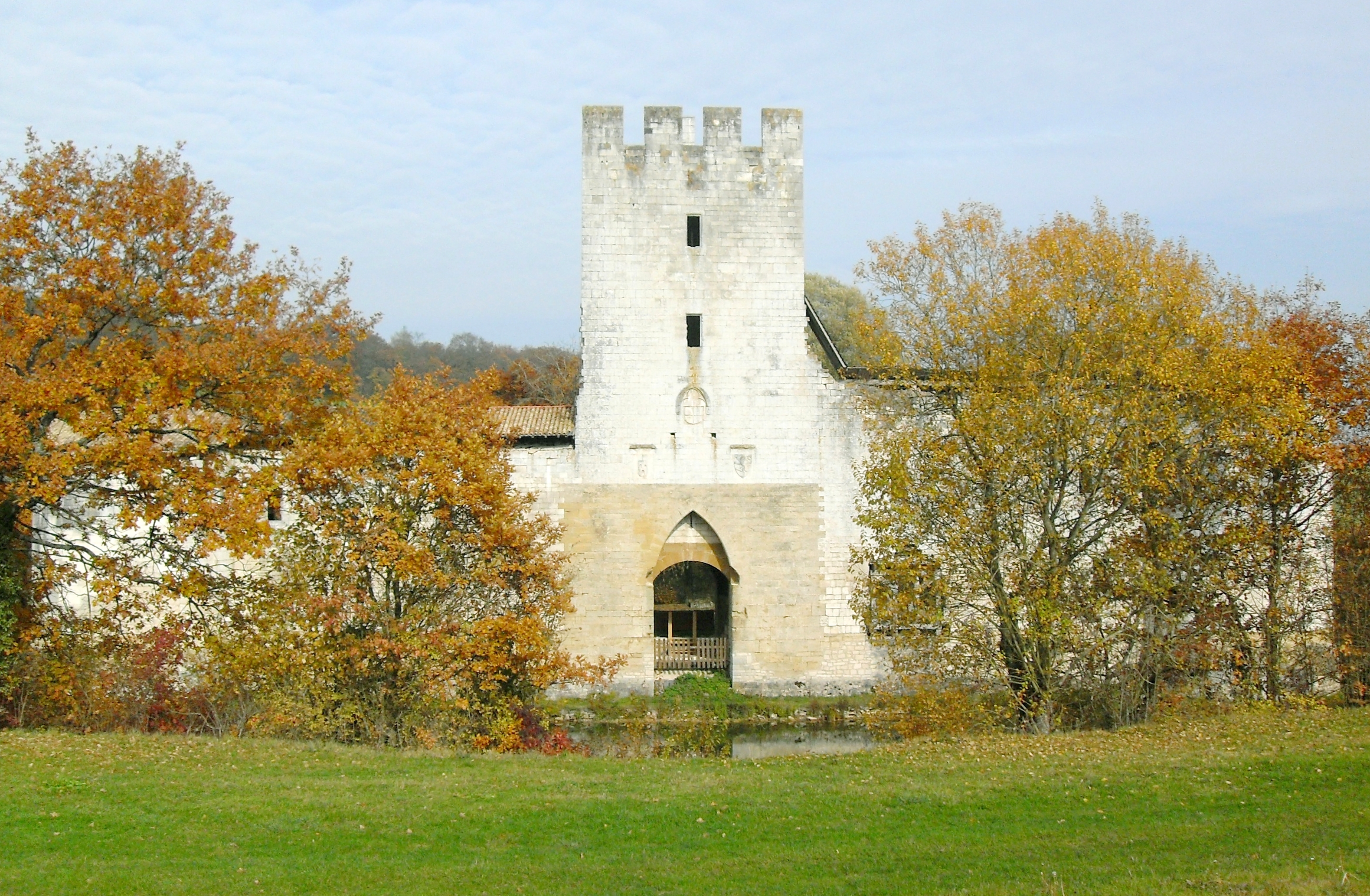 Vaucouleurs Meuse (55) - Château de Gombervaux. Armoiries du donjon : de Myon (au centre), des Salles (en bas à gauche), du Hautoy (en bas à droite).